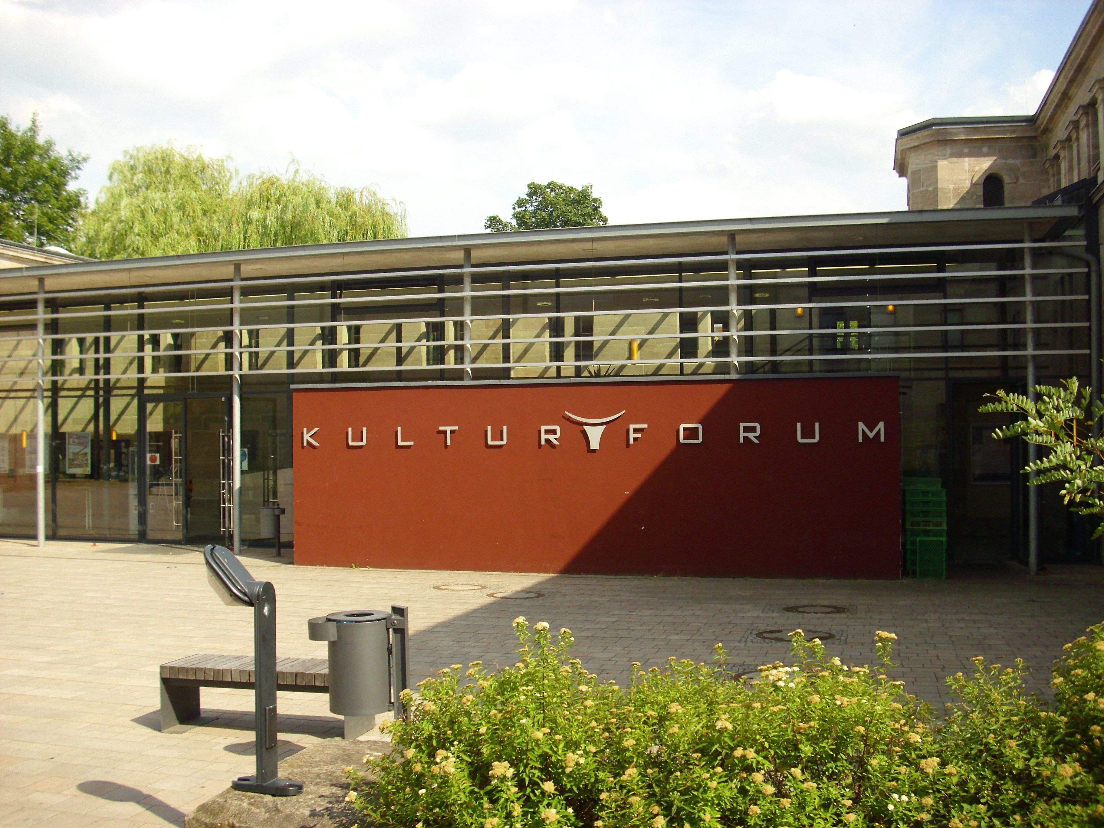 Ansicht des Kulturforums Fürth in der Würzburger Str. 4 vom Juli 2010